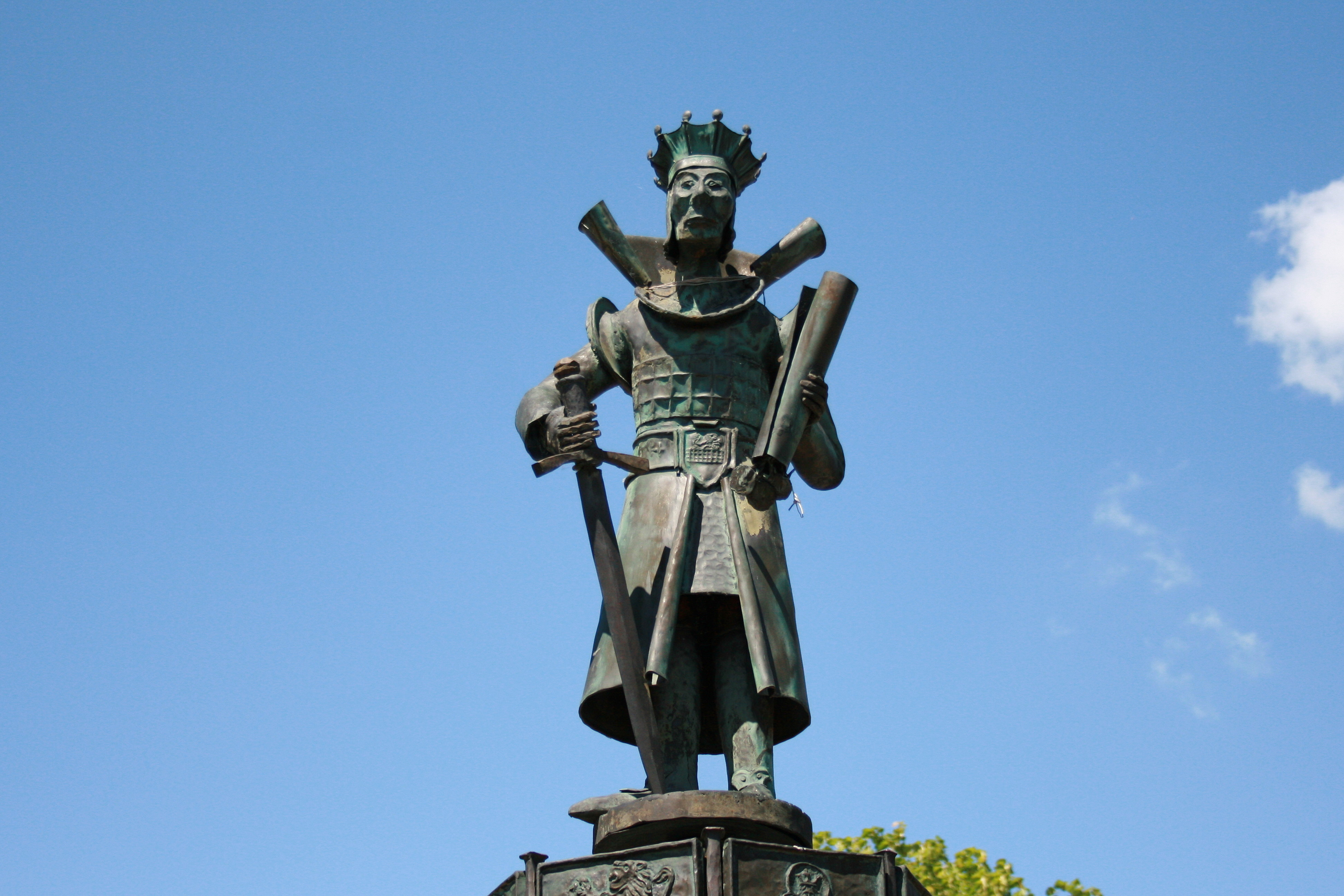 Neuenrader Stadtbrunnen, Bürgermeister Schmerbeck-Platz in Neuenrade